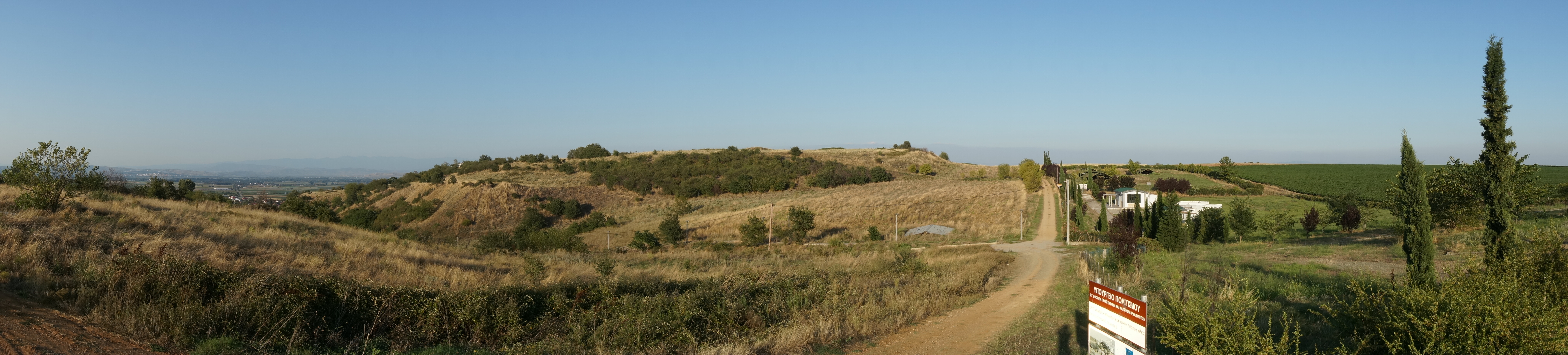 image de l"ancuien village de Europos.